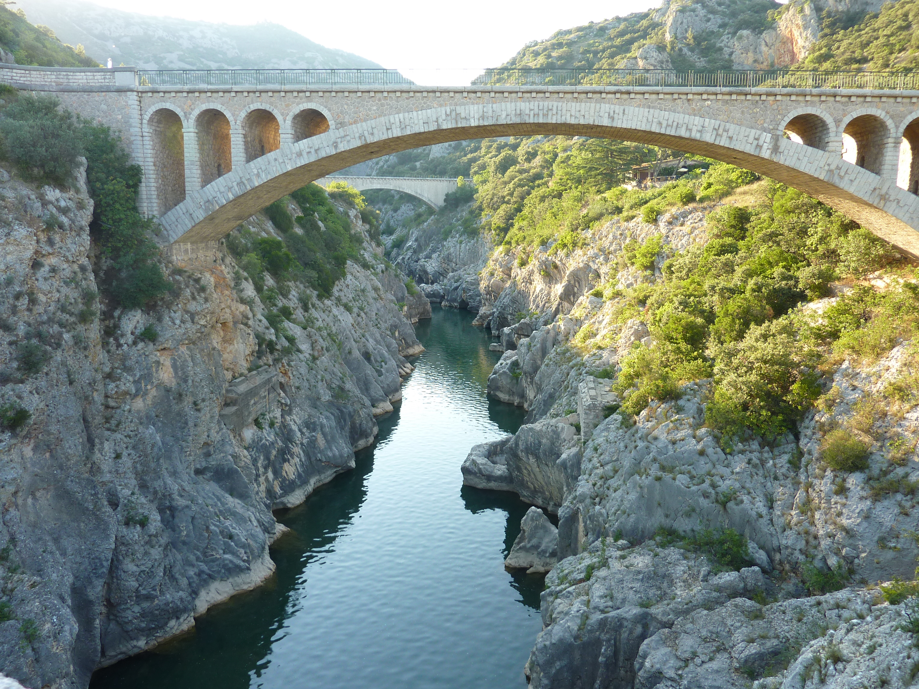 Près de Saint-Guilhem-le-Désert, sur la commune de Saint-Jean-de-Fos: pont de la route et aqueduc vue du pont du diable sur l'Hérault